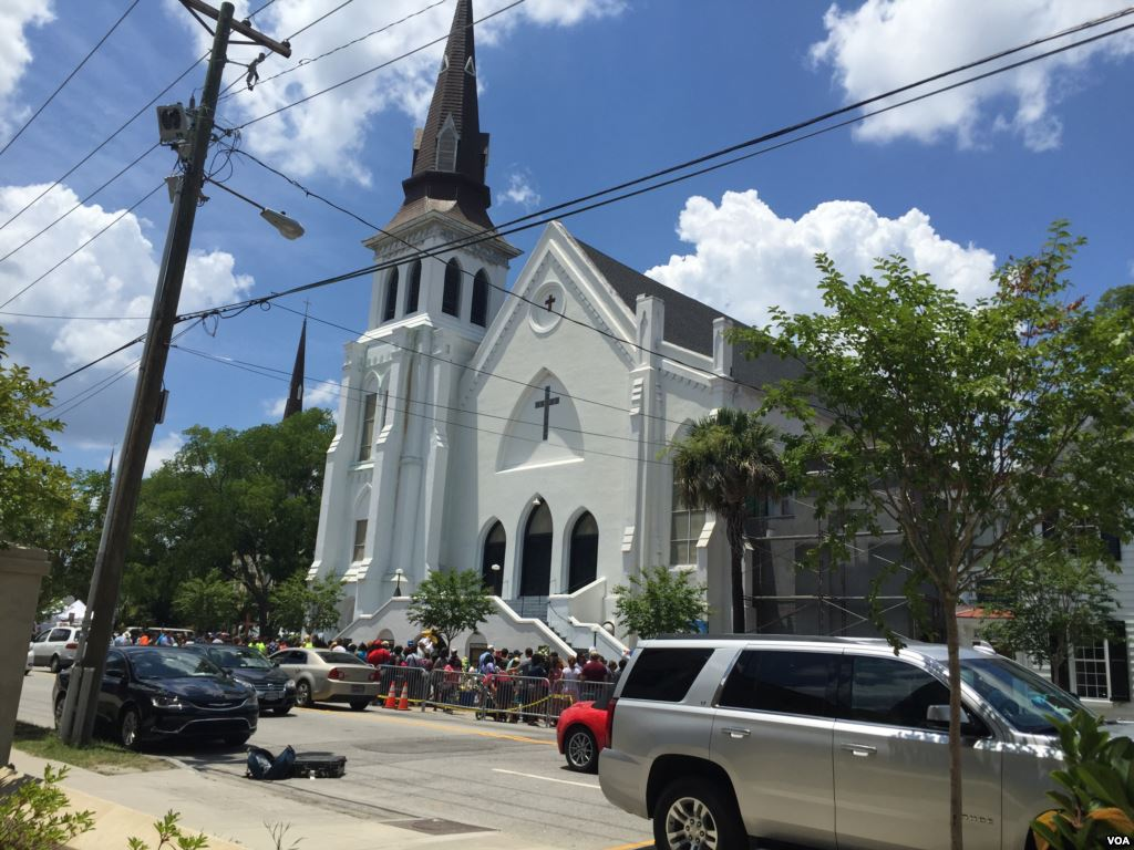 Charleston church memorial after attack